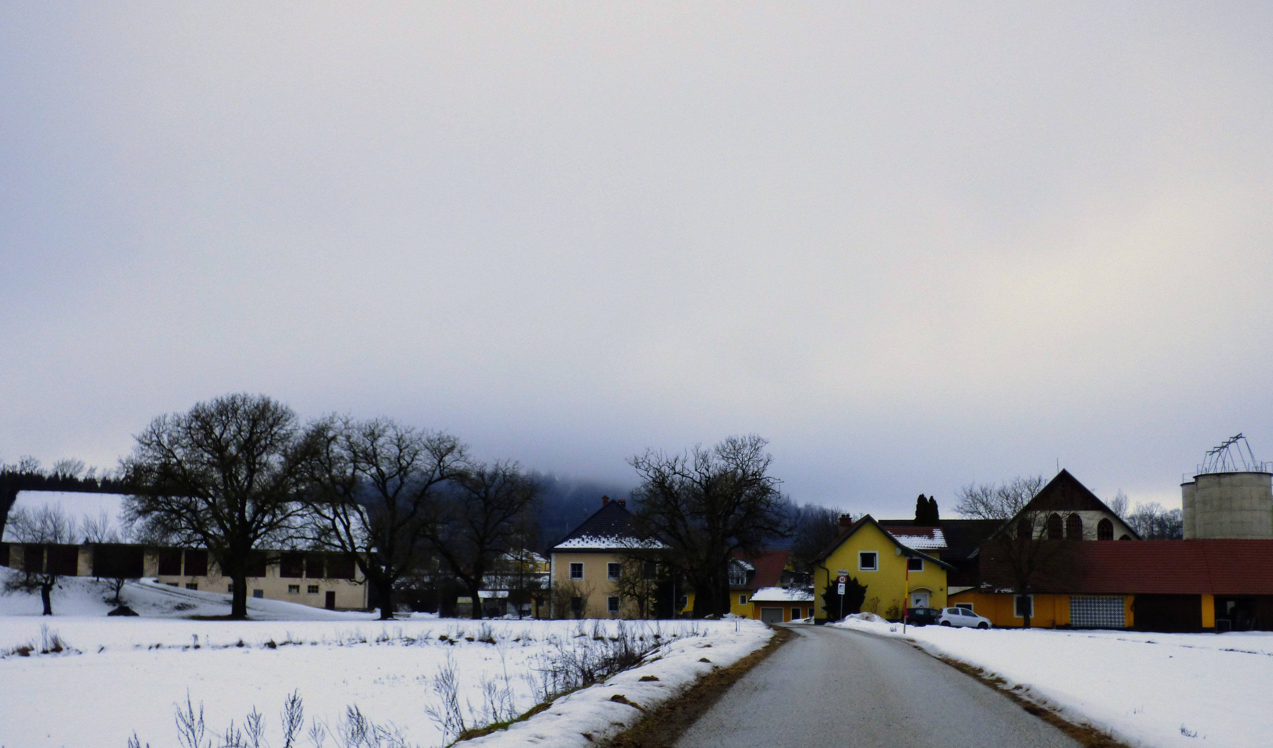 Dellach (Gemeinde St. Veit an der Glan). Ansicht von südosten